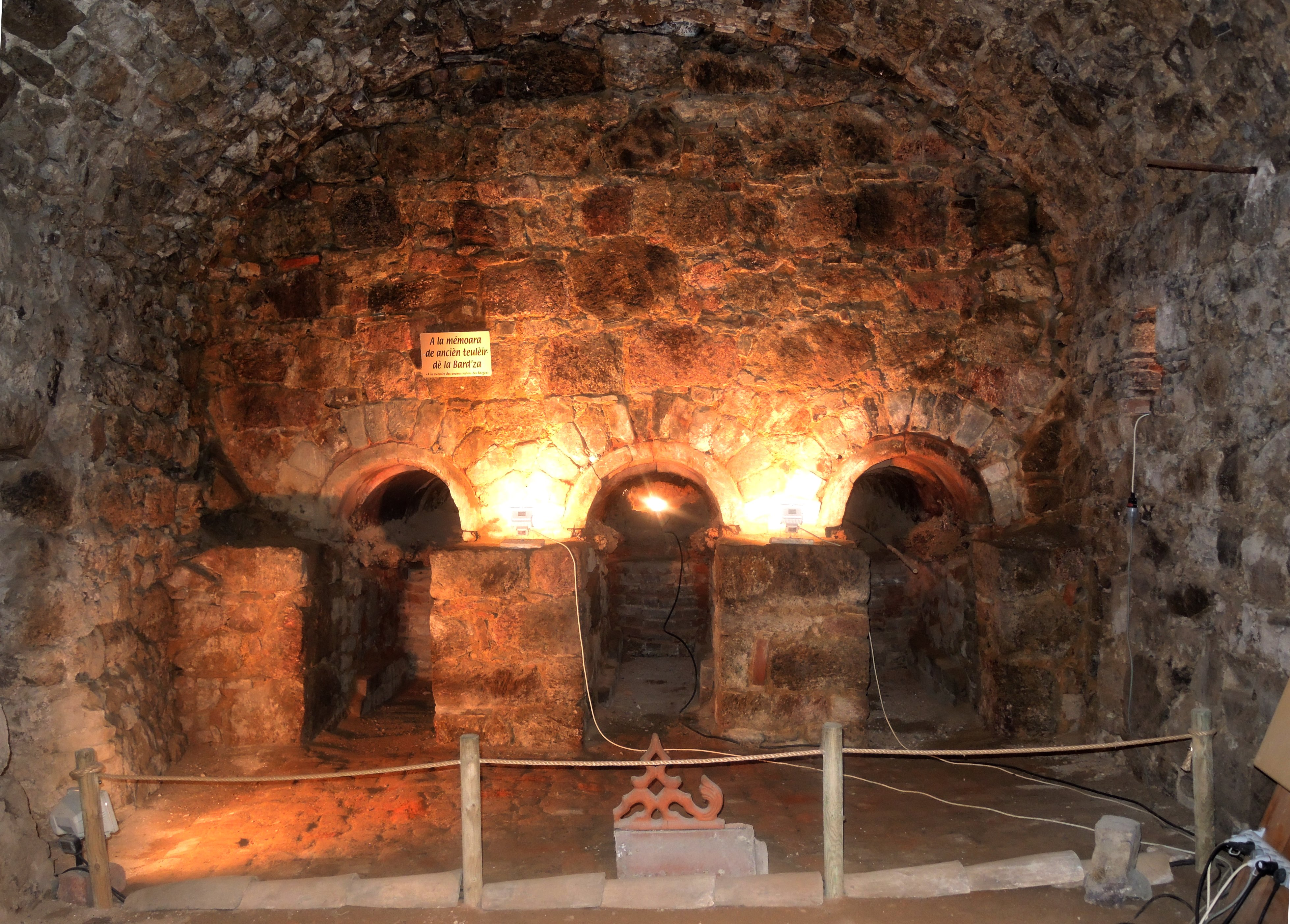 Saint-Etienne-de-Valoux détail